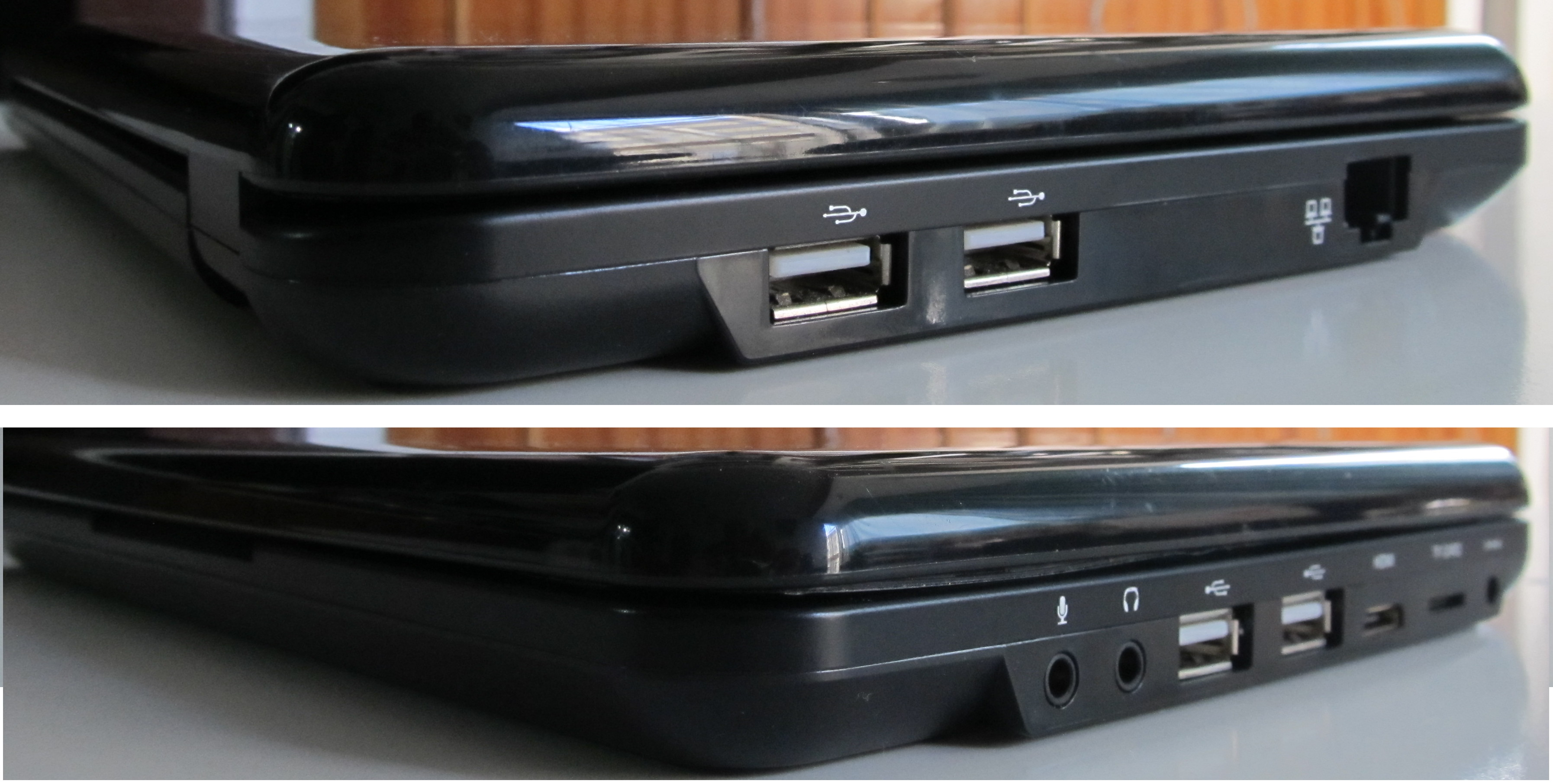 Conectores de los laterales del Airis Kira N10040 Izquierda 2 USB 2.0, un RJ-45 de red Derecha minijacks micrófono y auriculares, dos USB 2.0, mini HDMI, ranura de tarjeta SDHC, conector de alimentación